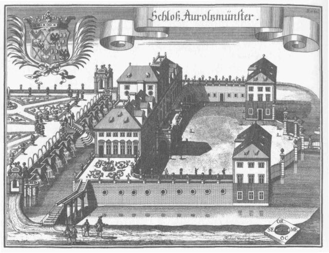 Schloss Aurolzmünster Stich von Michael Wenin